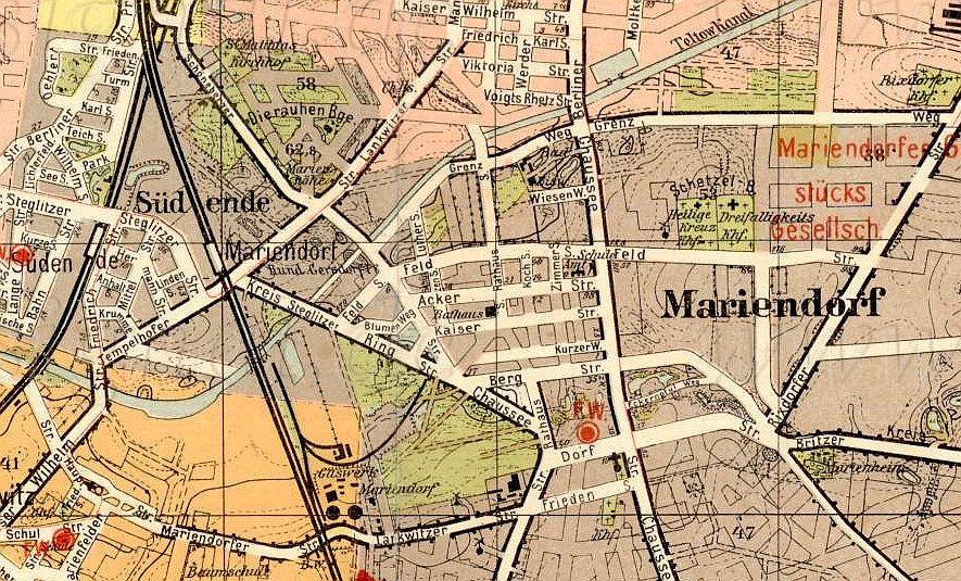 Ausschnitt aus der Beilage zum Adressbuch für Berlin und seine Vororte 1907